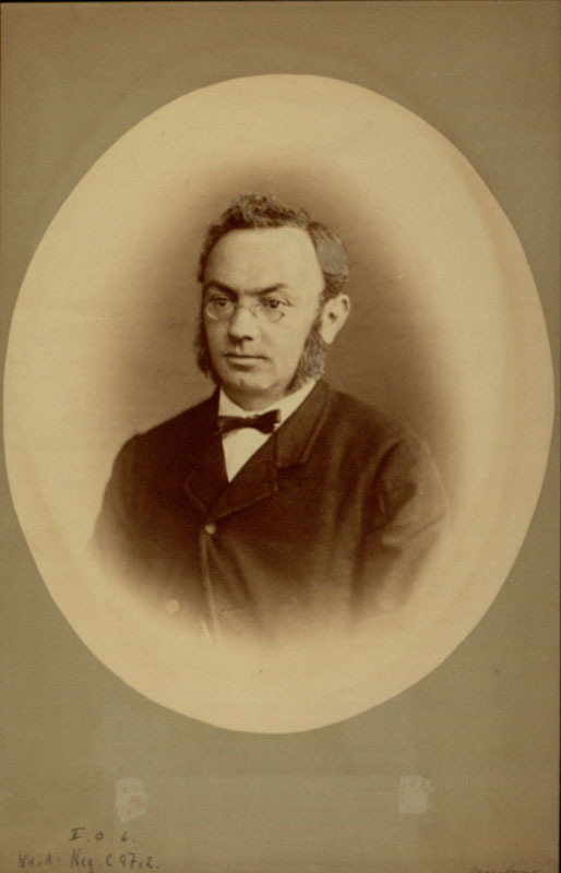 Zacharias Oppenheimer (1830-1904), Fotografie, Graph. Slg. P_2355